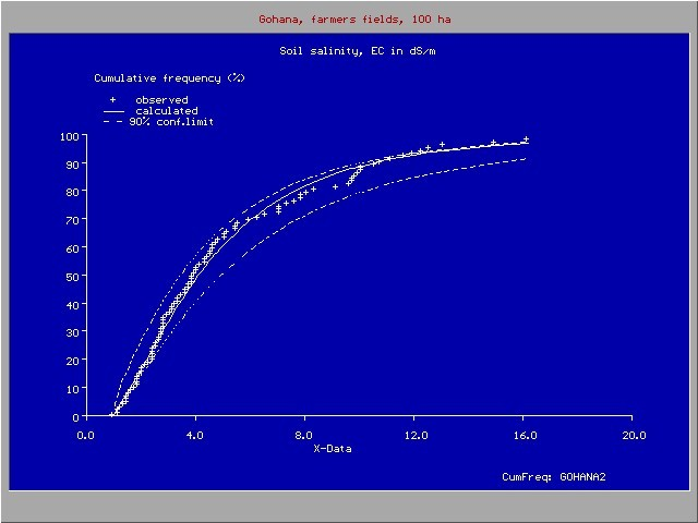 Frequency distribution showing spatial variation of soil salinity